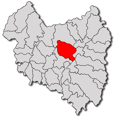 Categorie:Hărţi ale judeţului Covasna